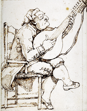 Caricatura de un tañedor de laúd por Pier Leone Ghezzi